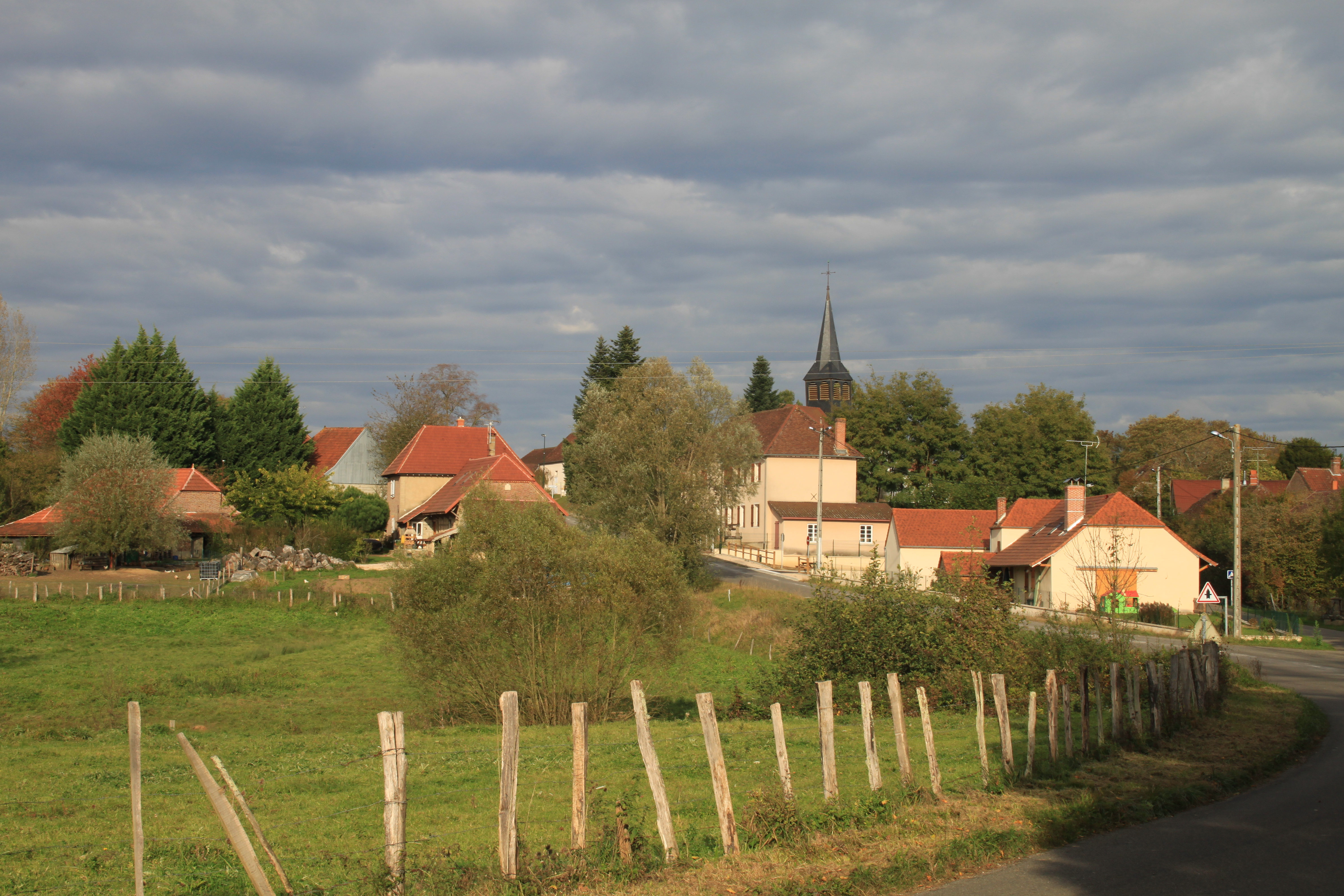 Montjay Ansicht des Dorfes